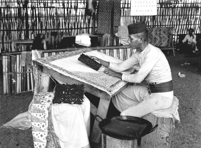 Foto. Deze foto is gemaakt op het terrein van een tentoonstelling of jaarmarkt.. Een batikker met wasstempels aan het werk op een stand van batikmakerij Tanaabang Batawi